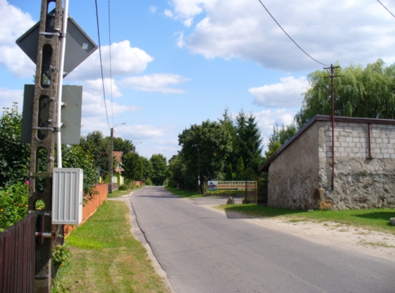 Pieczonki